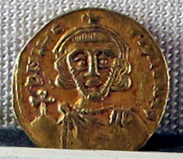 Palazzo Massimo alle Terme